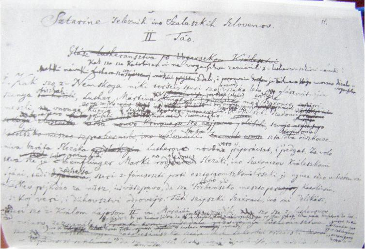 József Kossics: Vas és Zala megyei szlovénok régiségei, historical review